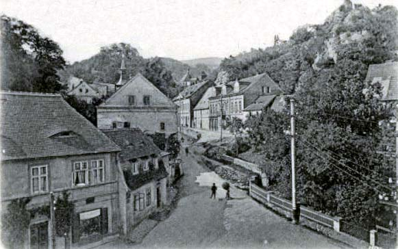 Město Krupka a hrad Rosenburg kolem r. 1908